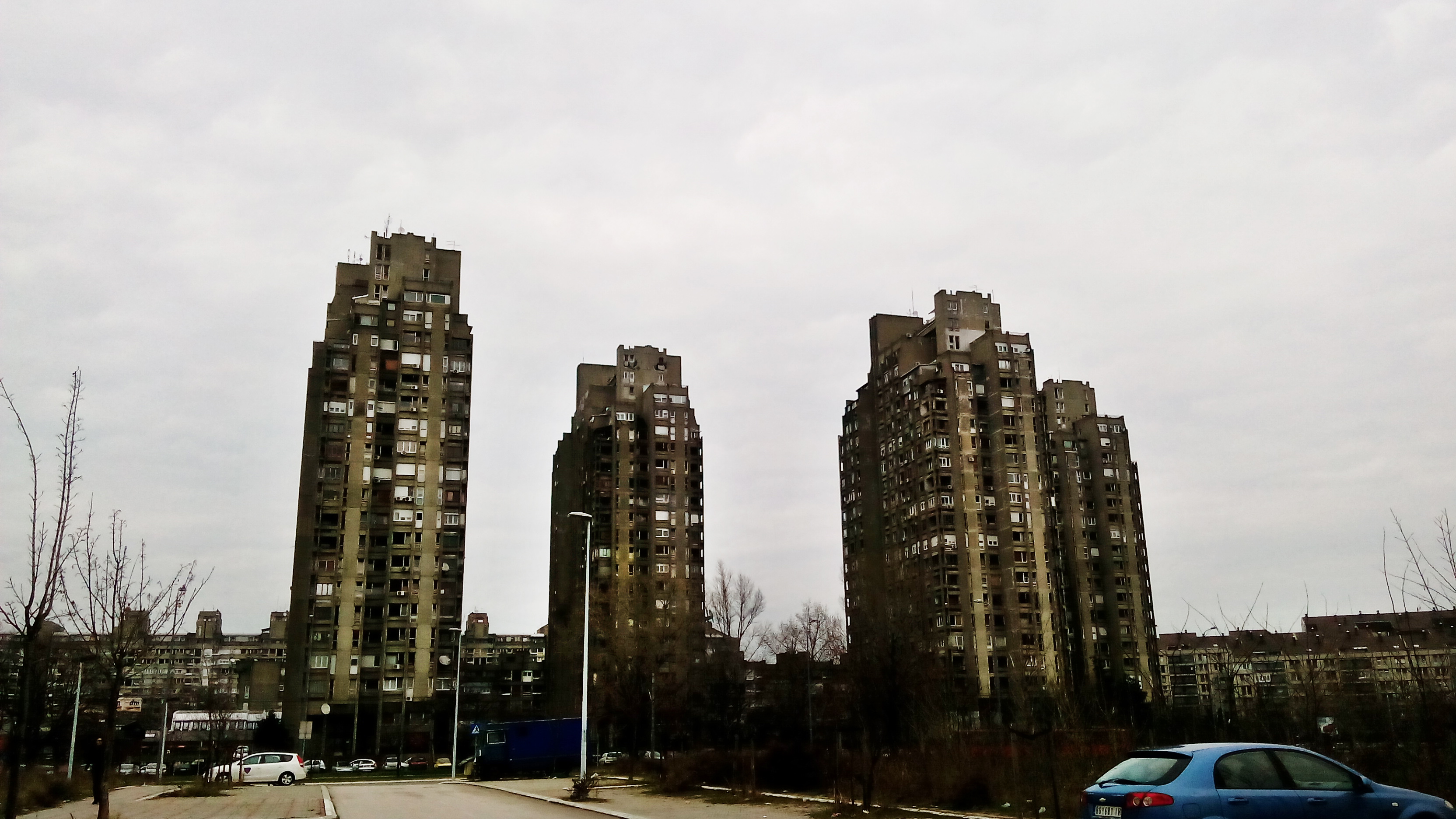 Солитери у блоку 23